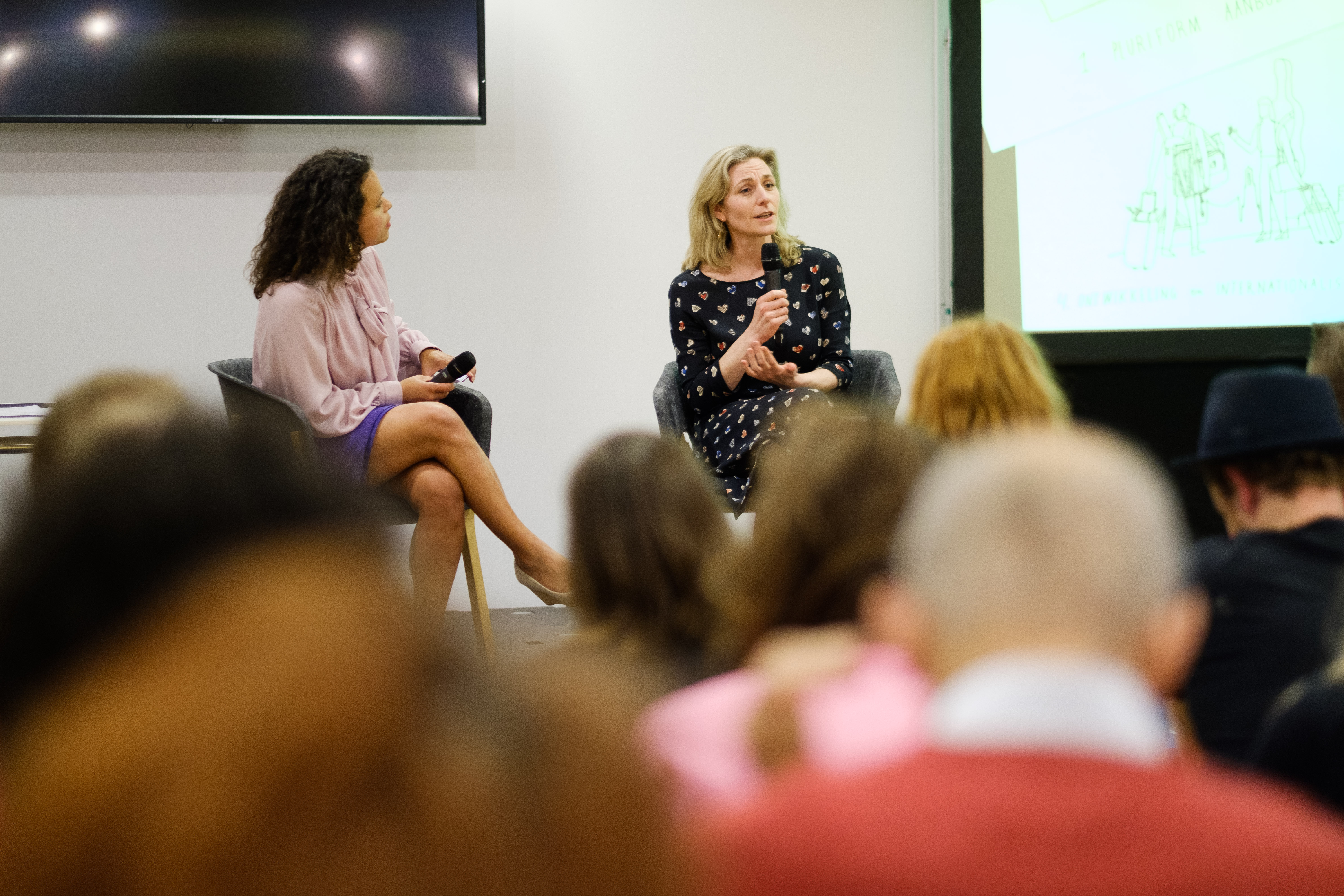 Gemeente Utrecht wil halverwege 2019 een uitgangspuntennotitie vaststellen voor de nieuwe cultuurnota 2021-2024. Ter voorbereiding wil de gemeente de cultuursector actief betrekken om te reageren op de documenten die reeds ontwikkeld zijn. Hiervoor vond op 30 januari 2019 een meedenksessie plaats. Ruim 200 deelnemers uit de culturele sector bespraken thema’s als de visie op cultuur 2030, cultuur voor iedereen, fair practice etc. Wethouder Cultuur Anke Klein beet het spits af met een presentatie over de Cultuurvisie.